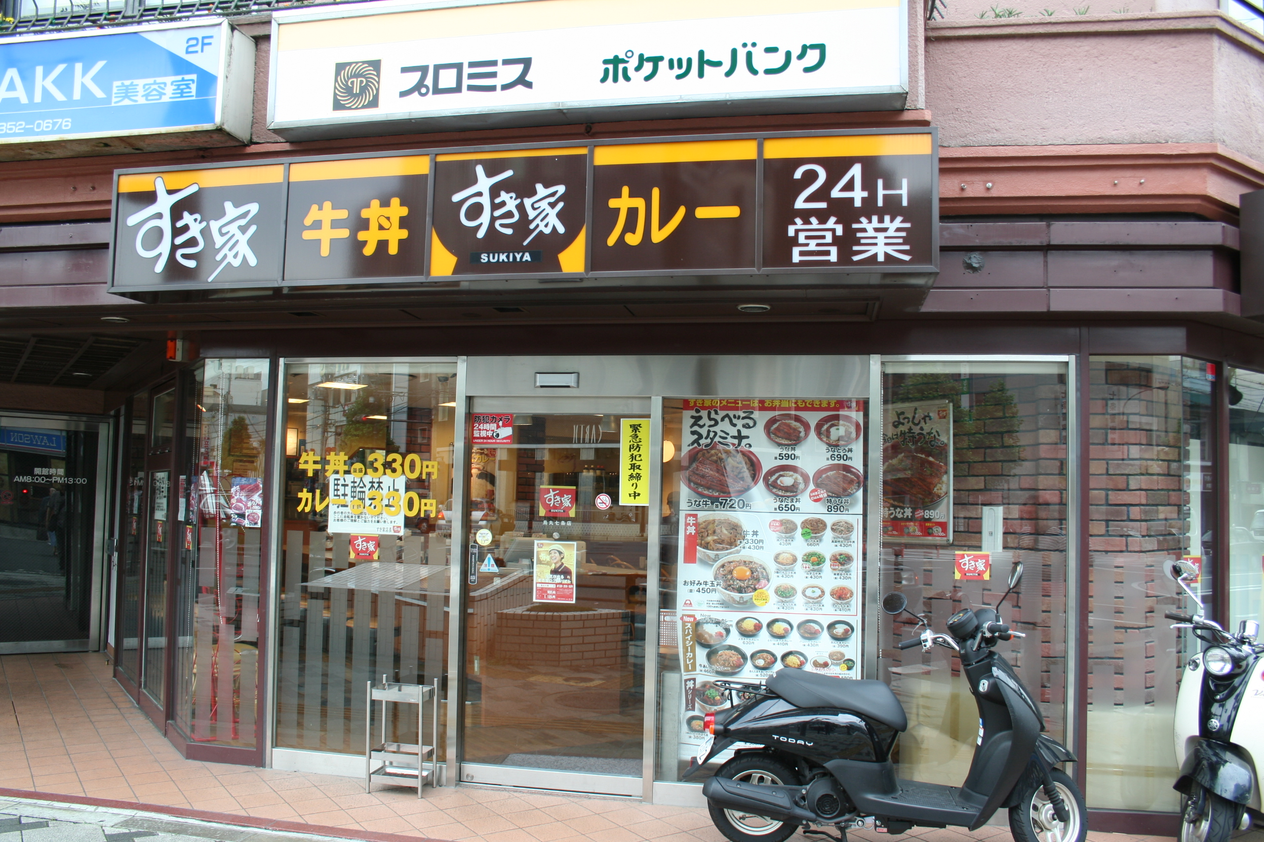 すき家烏丸七条店。